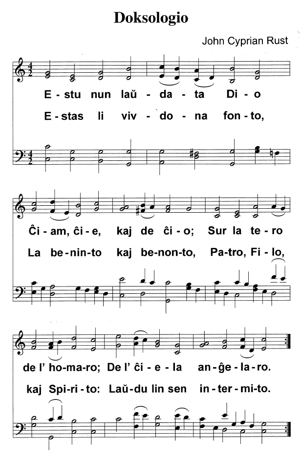 Kristana doksologio kun originalaj muziko kaj teksto de John Cyprian Rust, laŭ Himnaro Esperanta (la originala eldono estis en Ordo de Diservo, 1907). Mi faris NWC-dosieron, printis ĝin, kaj skanis la printaĵon, hodiaŭ.